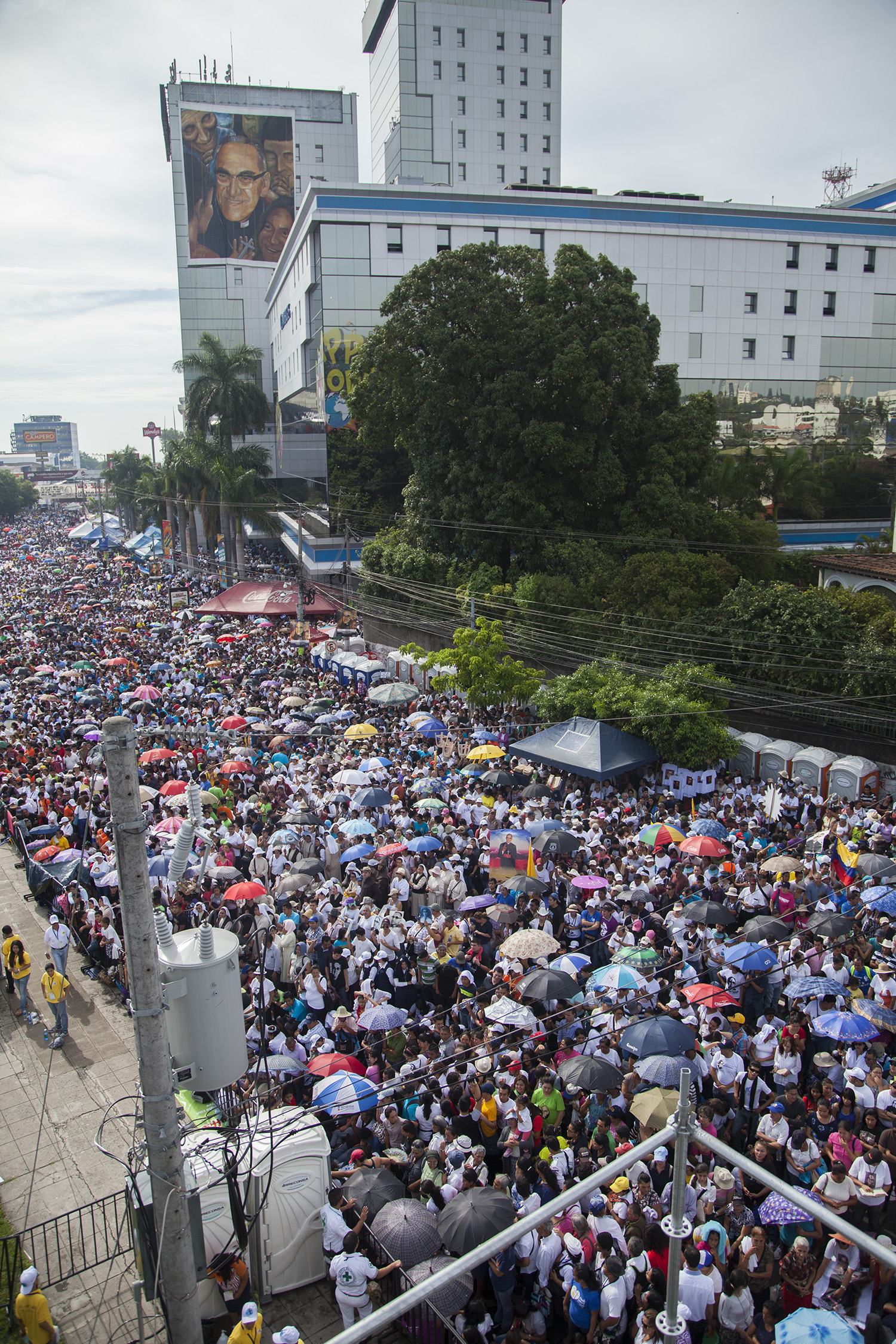 San Salvador (El Salvador), 22 de mayo de 2015. En la Plaza Salvador del Mundo se llevó a cabo la Beatificación de Monseñor Oscar Arnulfo Romero, asesinado el 24 de marzo de 1980 mientras celebraba la misa en la Capilla del Hospital La Divina Providencia. Foto: Luis Astudillo C. / Cancillería